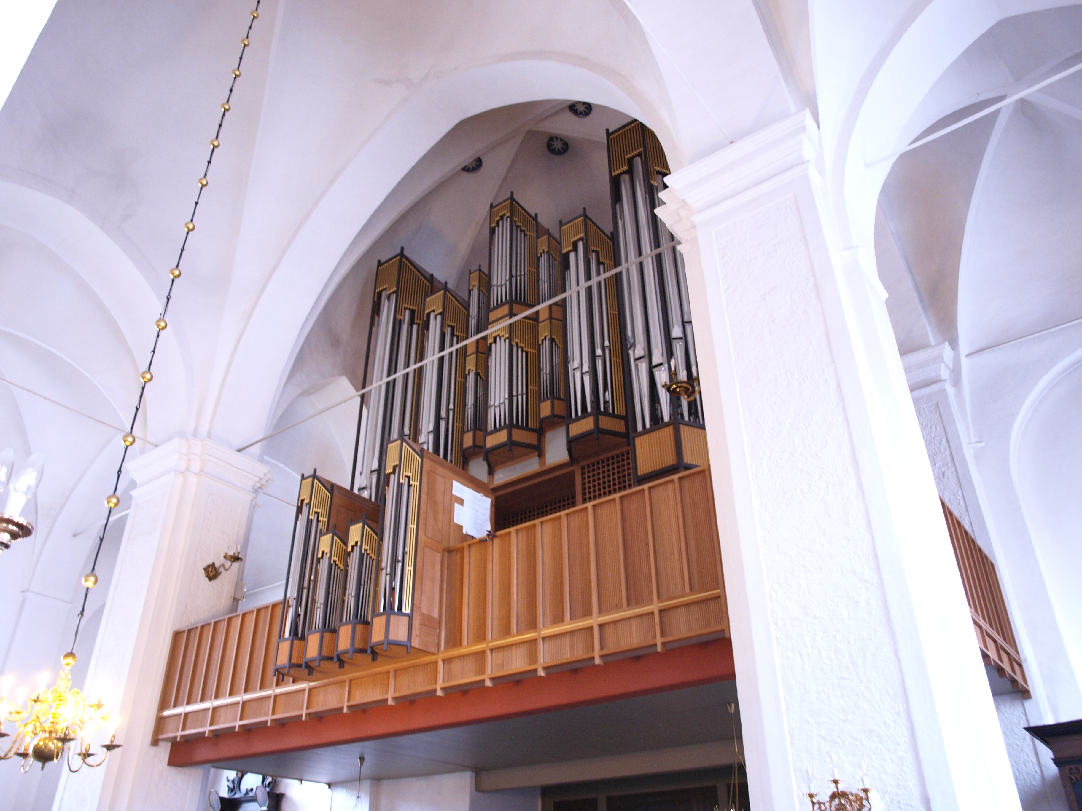 Sankt Nikolai Kirke (Kolding Kommune) kirkens orgel med 57 stemmer, bygget i 1977 af Marcussen & Søn.